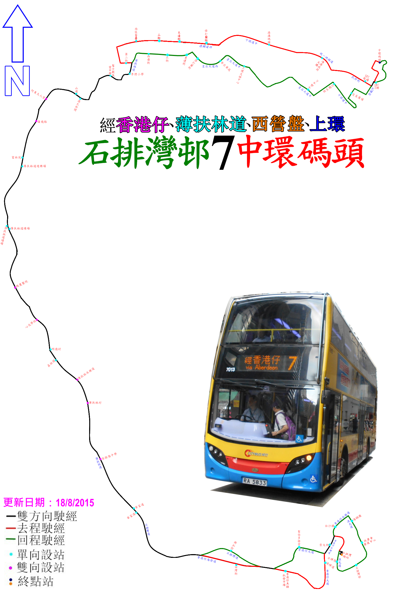 中文（香港）: 城巴7號線的走線圖